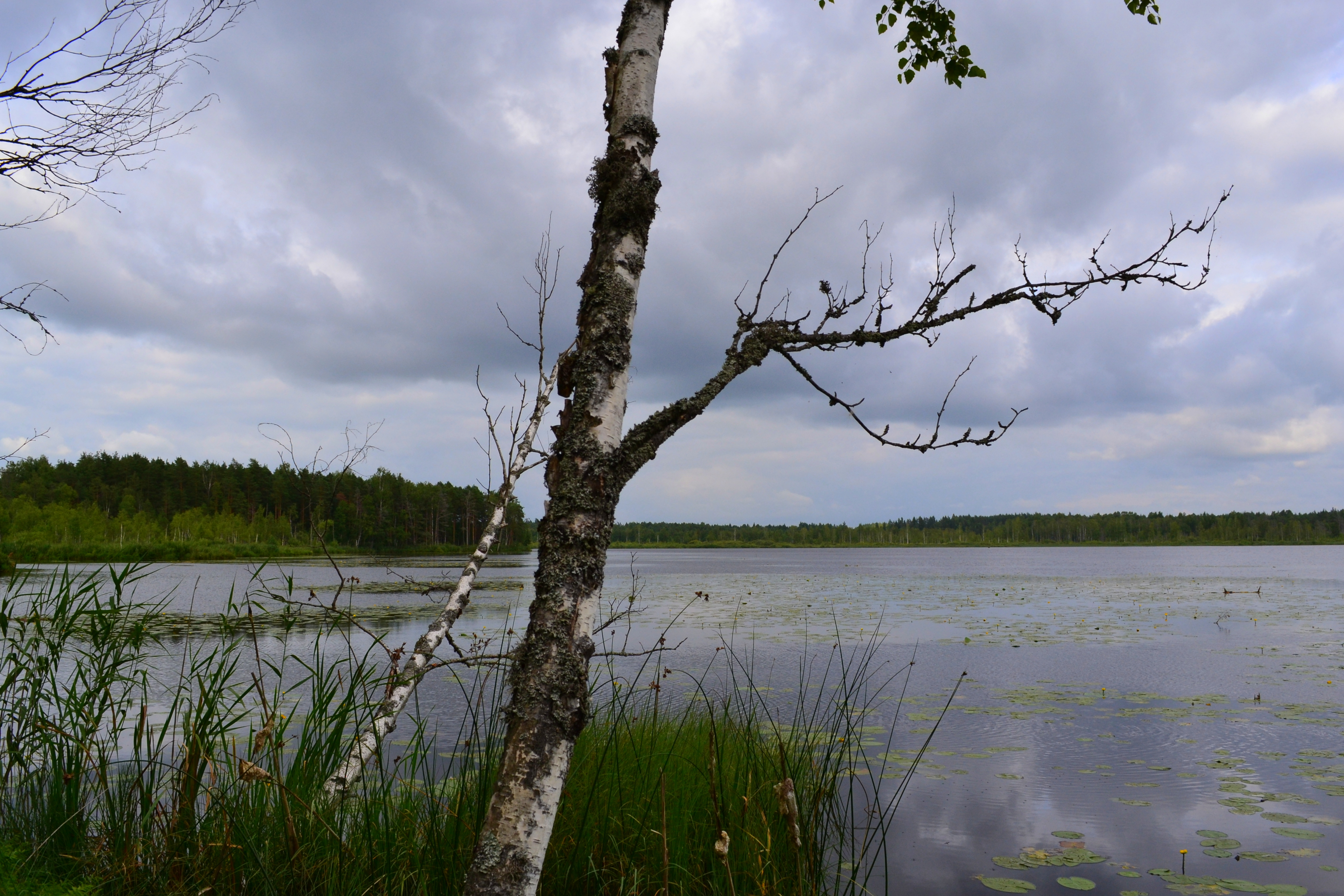 Suur Pehmejärv (ka Pehmejärv) asub Võrumaal Antsla vallas Ähijärve külas.